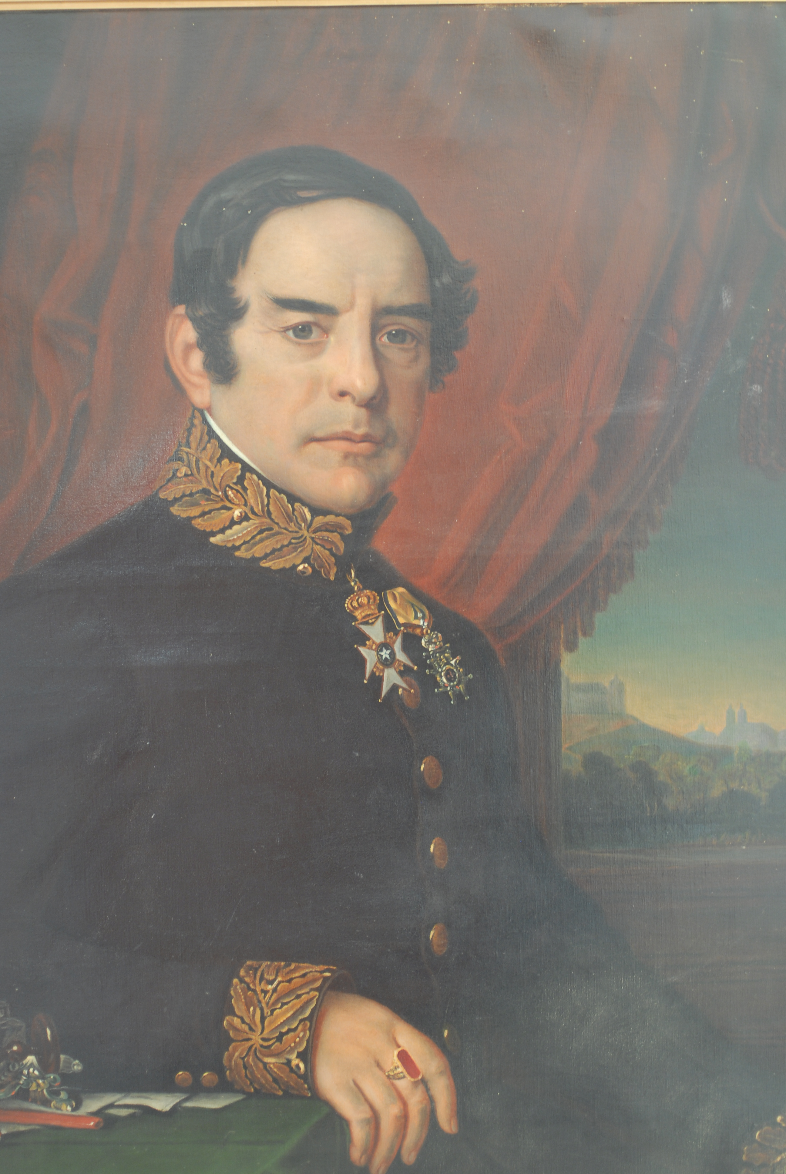 Robert Fredrik von Kraemer, samtida porträtt